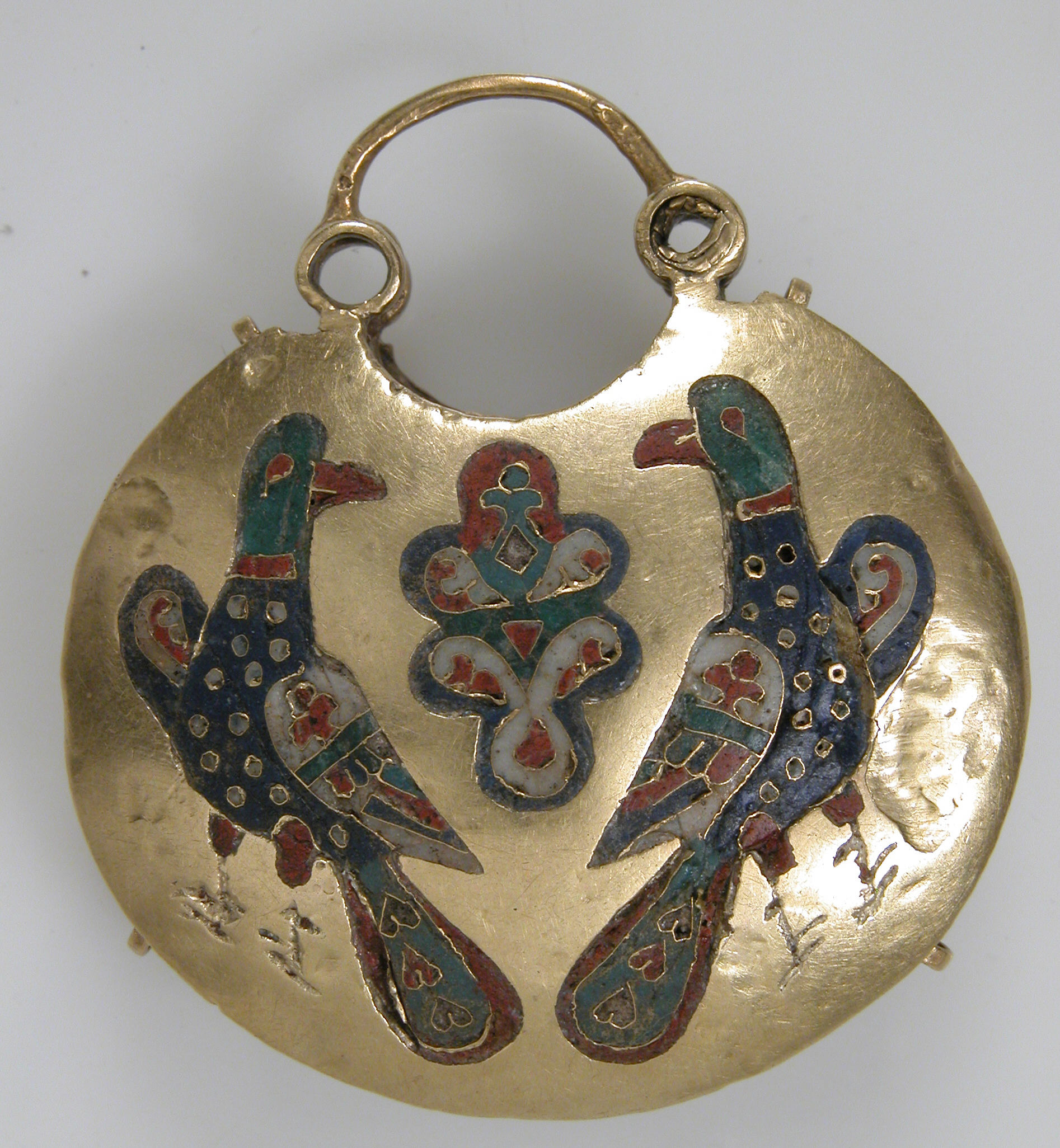 Kievan Rus'; Temple pendant; Enamels-Cloisonné